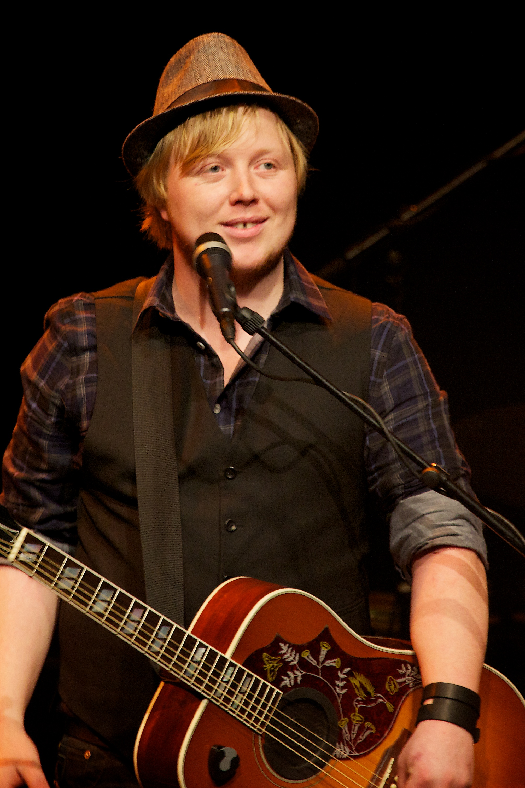 Kurt Nilsen i Ibsenhuset, Skien, 2. mars 2010.